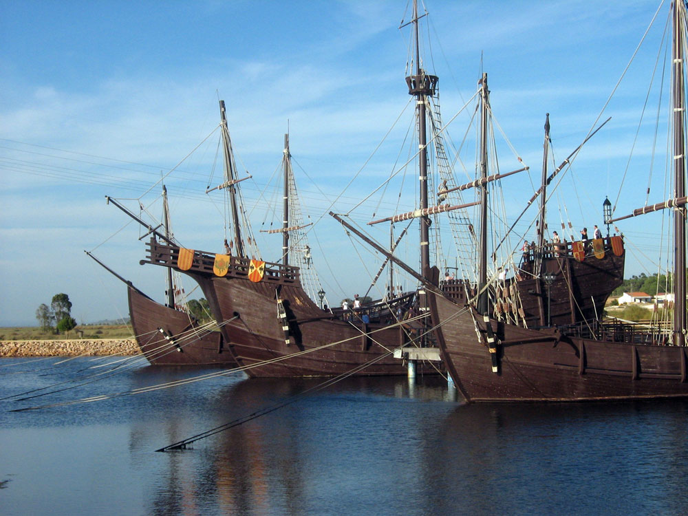 Réplica de los tres barcos que participaron en el primer viaje de Cristobal Colón, en el Muelle de las Carabelas (Palos de la Frontera, España).